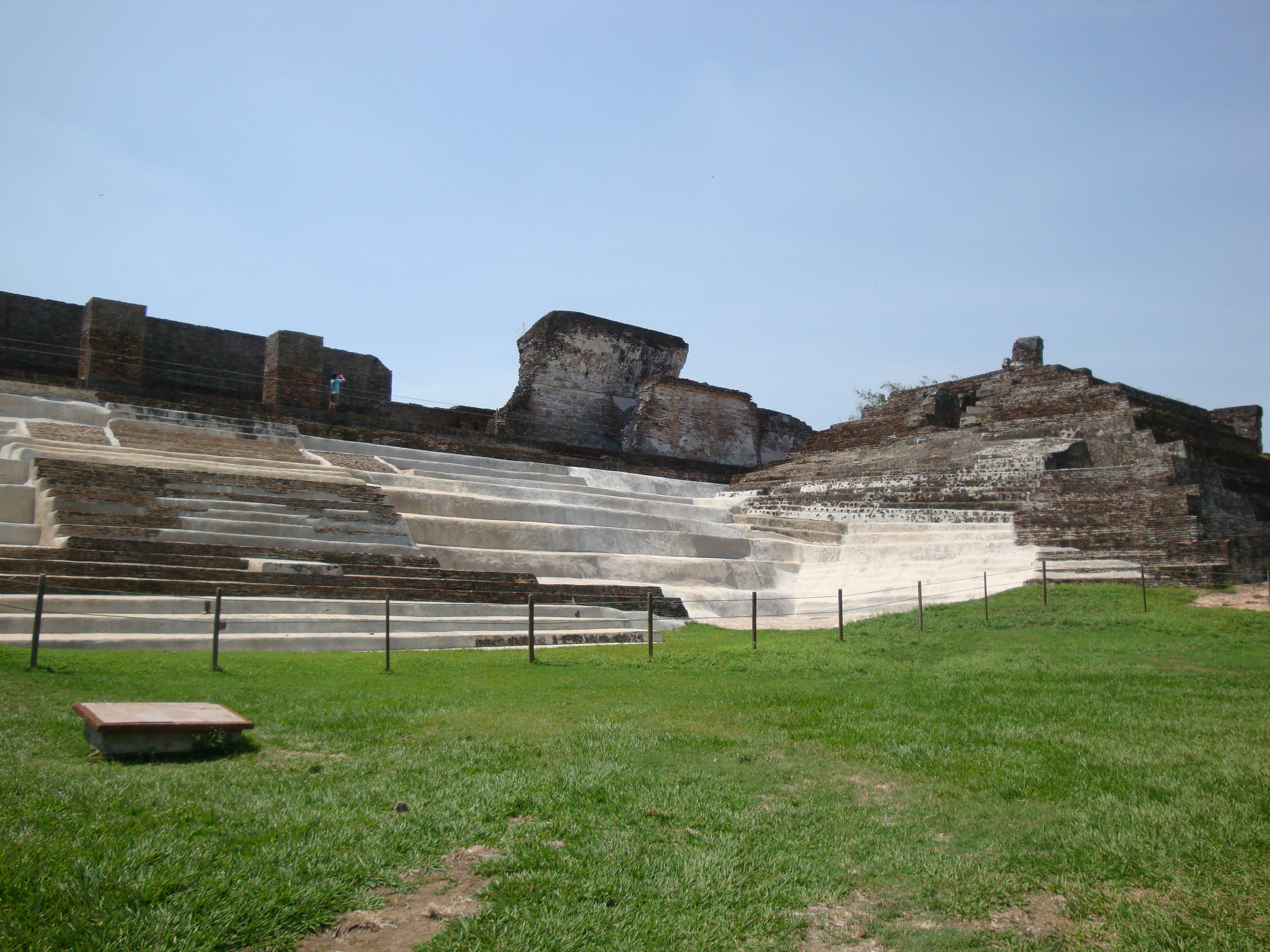 El Palacio y el Templo V, en la zona arqueológica maya de Comalcalco, Tabasco, México.